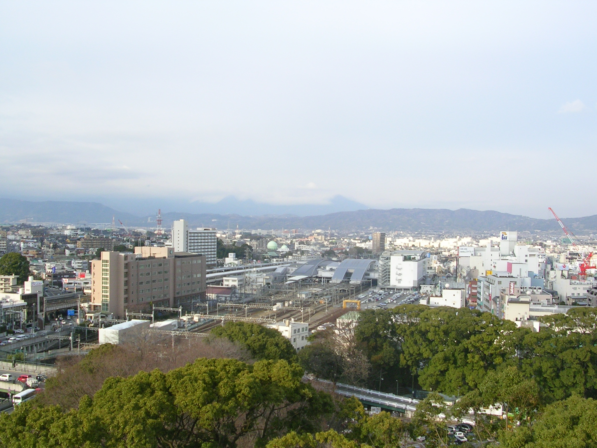 Odawara, Kanagawa, Japon.